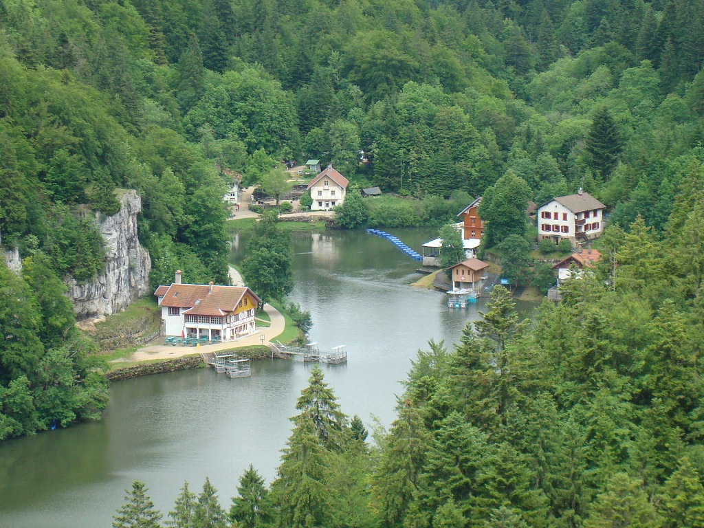 Villers-le-lac, Doubs, site du saut du Doubs (terminal des bâteaux)